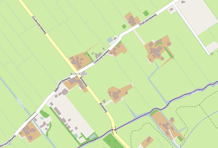 geografische kaart via [1]